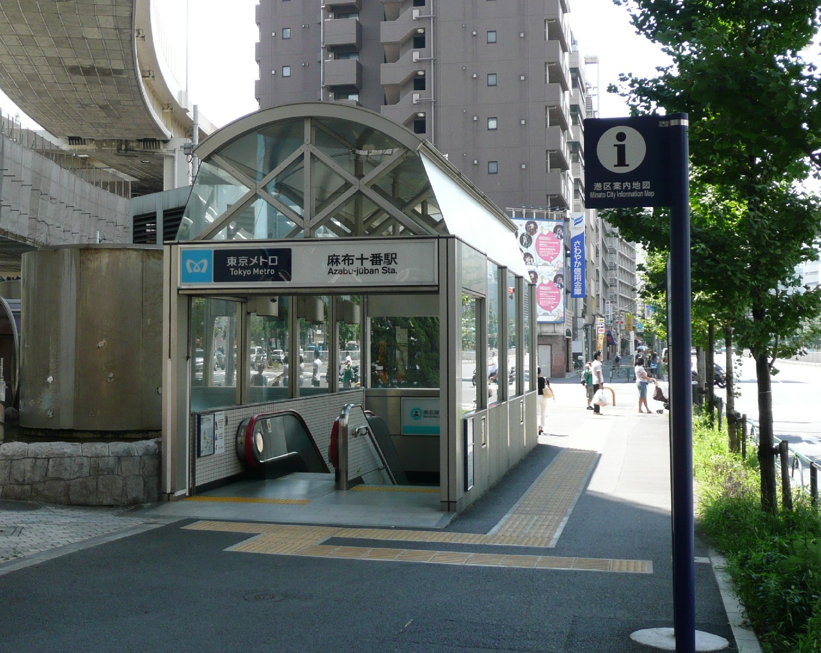 麻布十番駅3番出入口